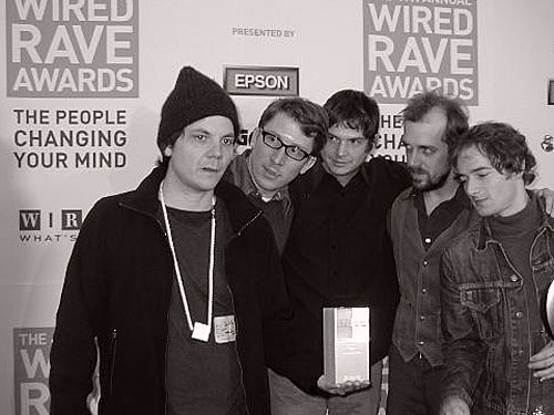 Wilco